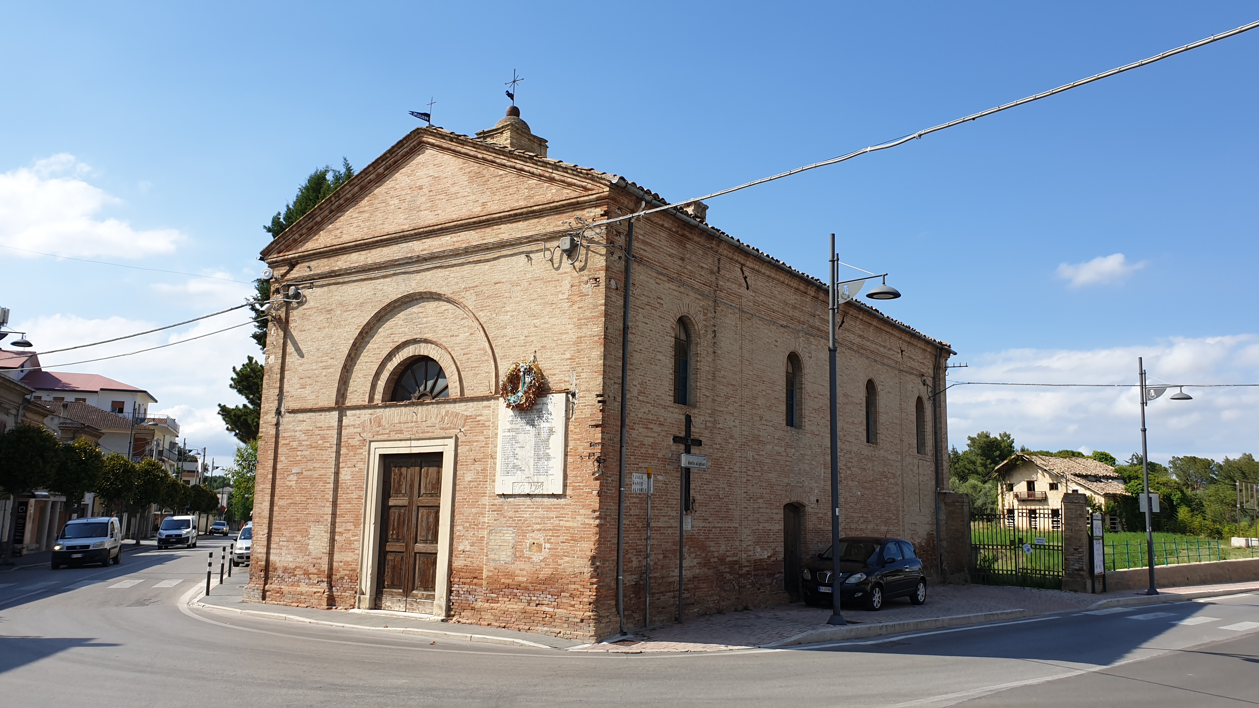 Cepagatti - Chiesa della Madonna del Carmine